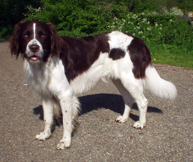 Drentse Patrijshond, Hunderasse aus den Niederlanden